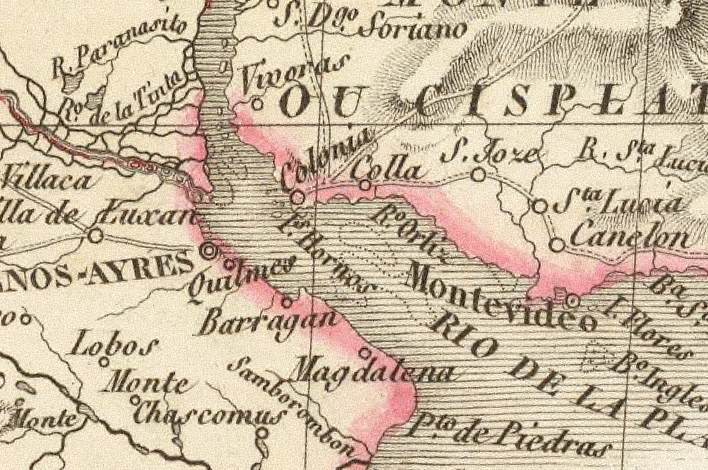 Detalle del río de la Plata en mapa francés de 1828/1833